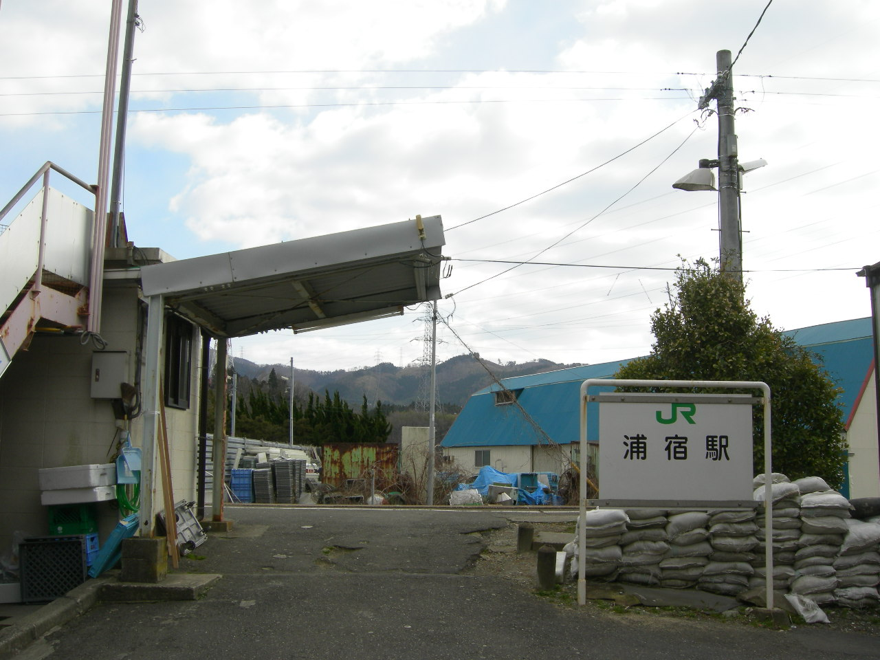 JR石巻線（JR Ishinomaki line）浦宿駅（Urashuku station）